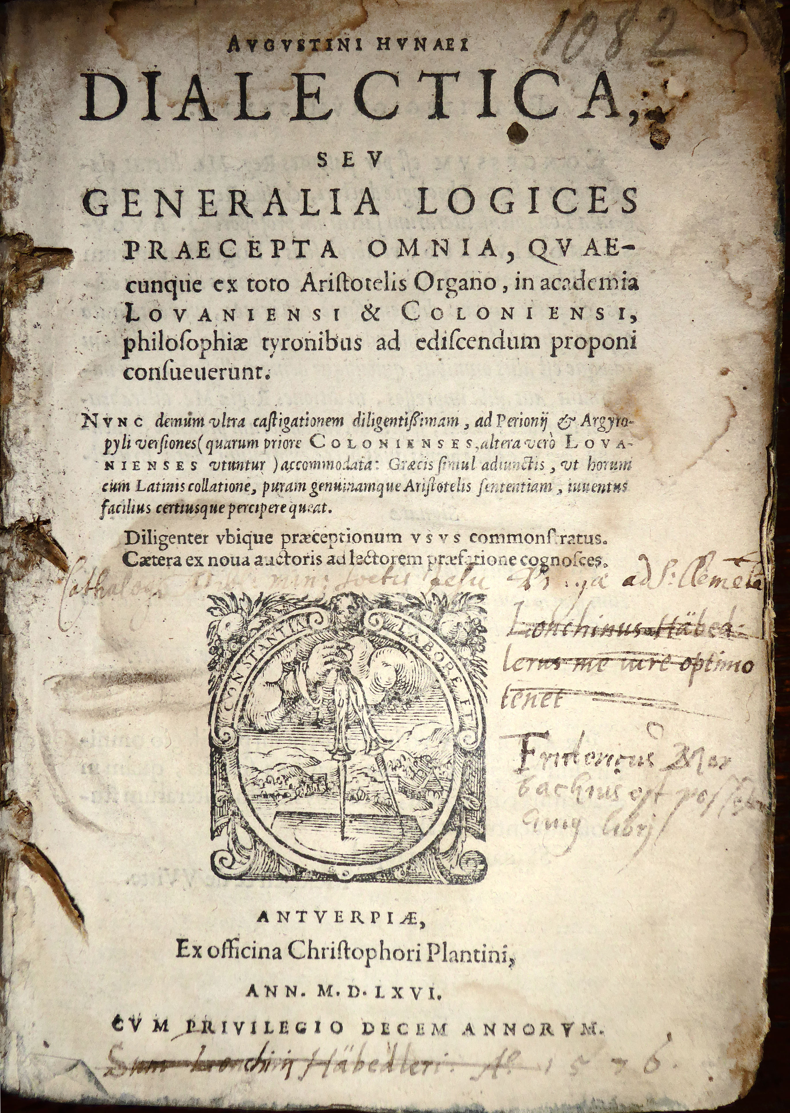 Frontispiz des Buches „Dialectica, seu Generalia logices praecepta omnia“ von Augustini Hunaei, herausgegeben von Christophori Plantini, 1566 Antwerpen. (15,7x10,8 cm) Provenienz: Vormals - Bibliotheca Fidecomissaria Familiae Risenfelsianae Stabilitae in Castro Domini Toparchici Seisenegg